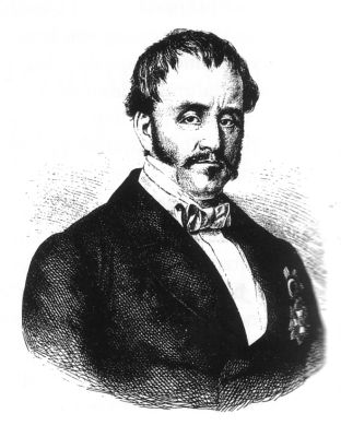 Fürst Otto Viktor von Schönburg-Waldenburg